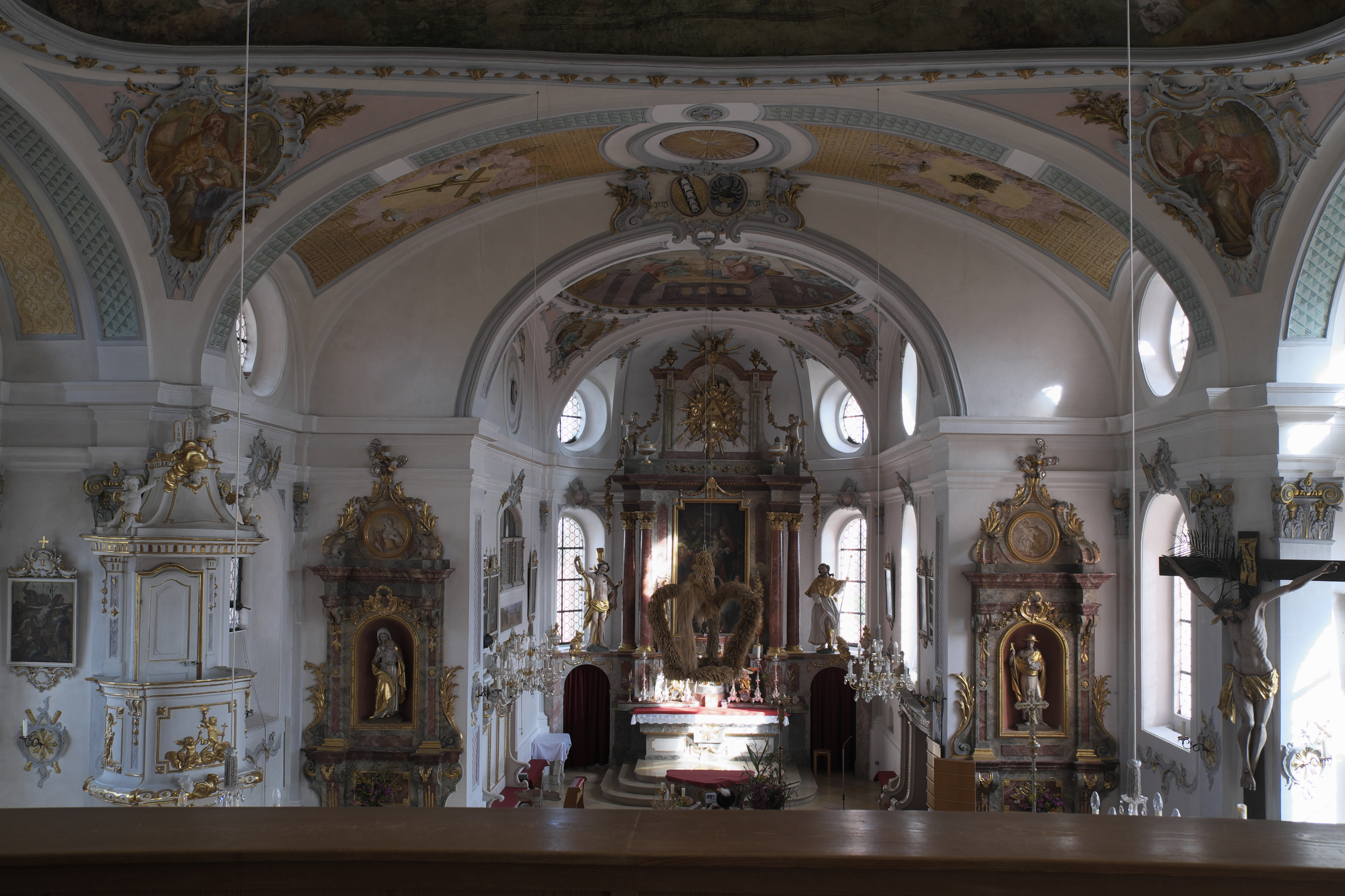 Katholische Pfarrkirche St. Nikolaus in Reichling im Landkreis Landsberg am Lech (Bayern/Deutschland), Innenraum